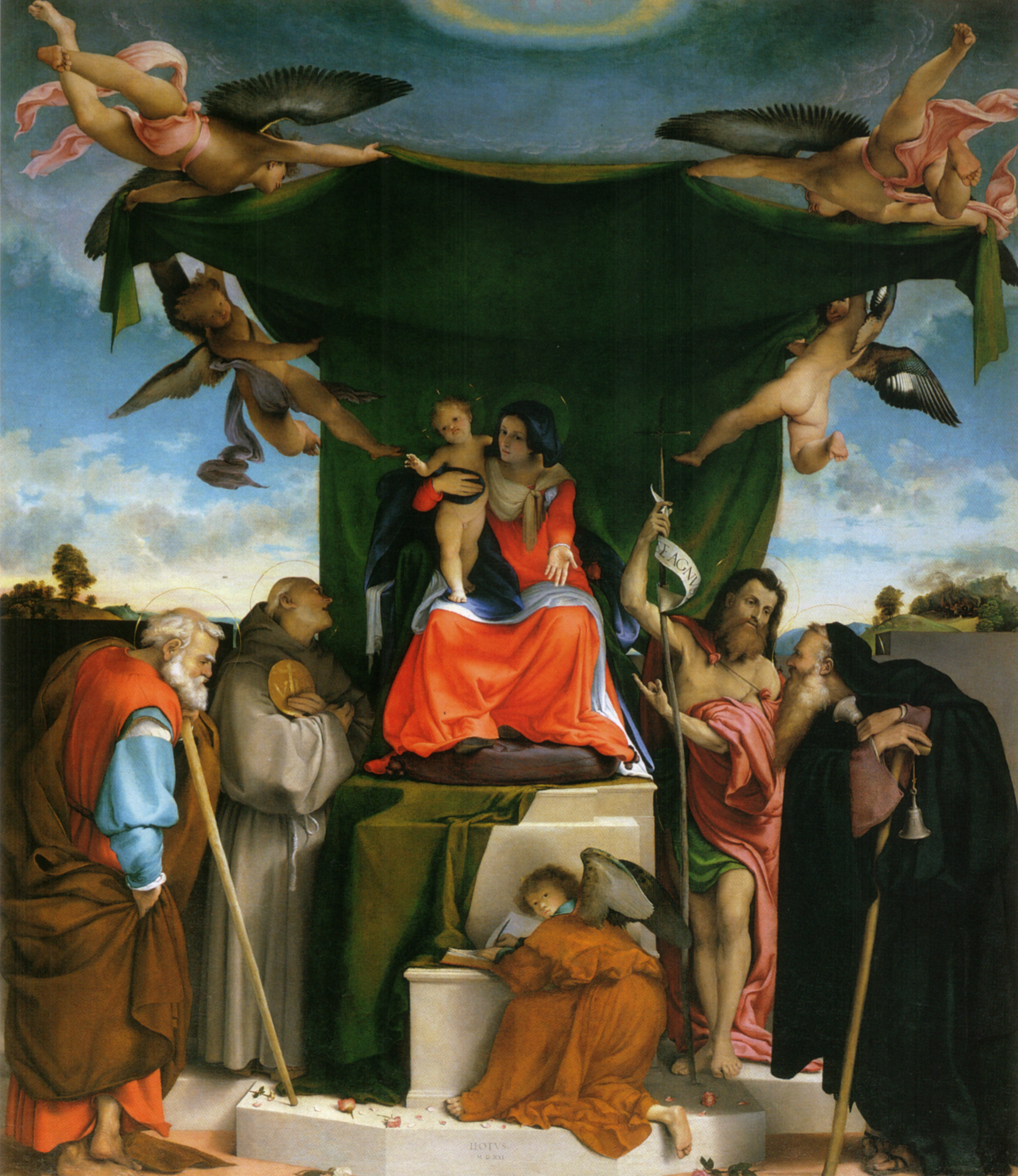 links: Hl. Josef, Hl. Bernhard, rechts: Hl. Johannes der Täufer, Hl. Antonius Abbate